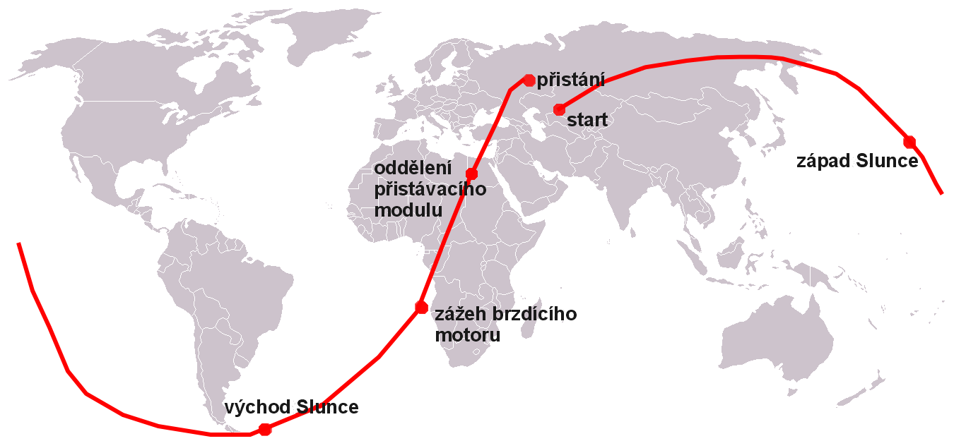 Oběžná dráha lodi Vostok 1 s českými popisky.